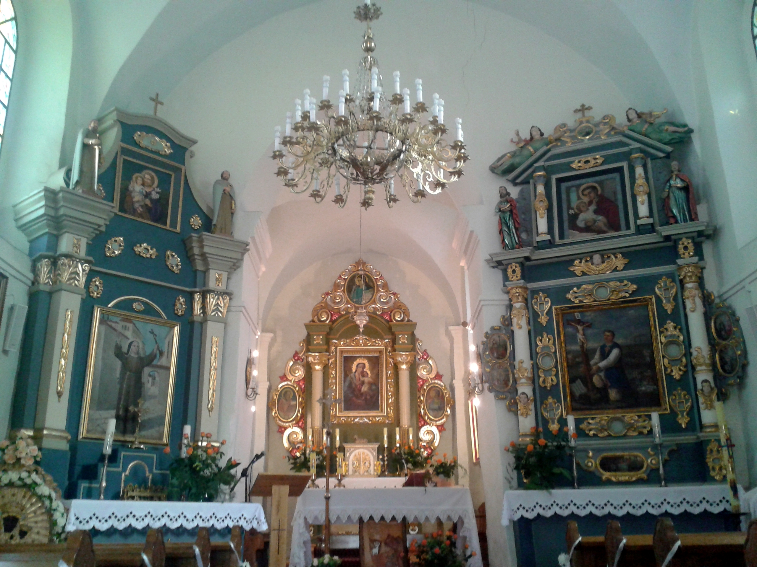 Siedlątków 1, kościół św. Marka, XVII, XIX